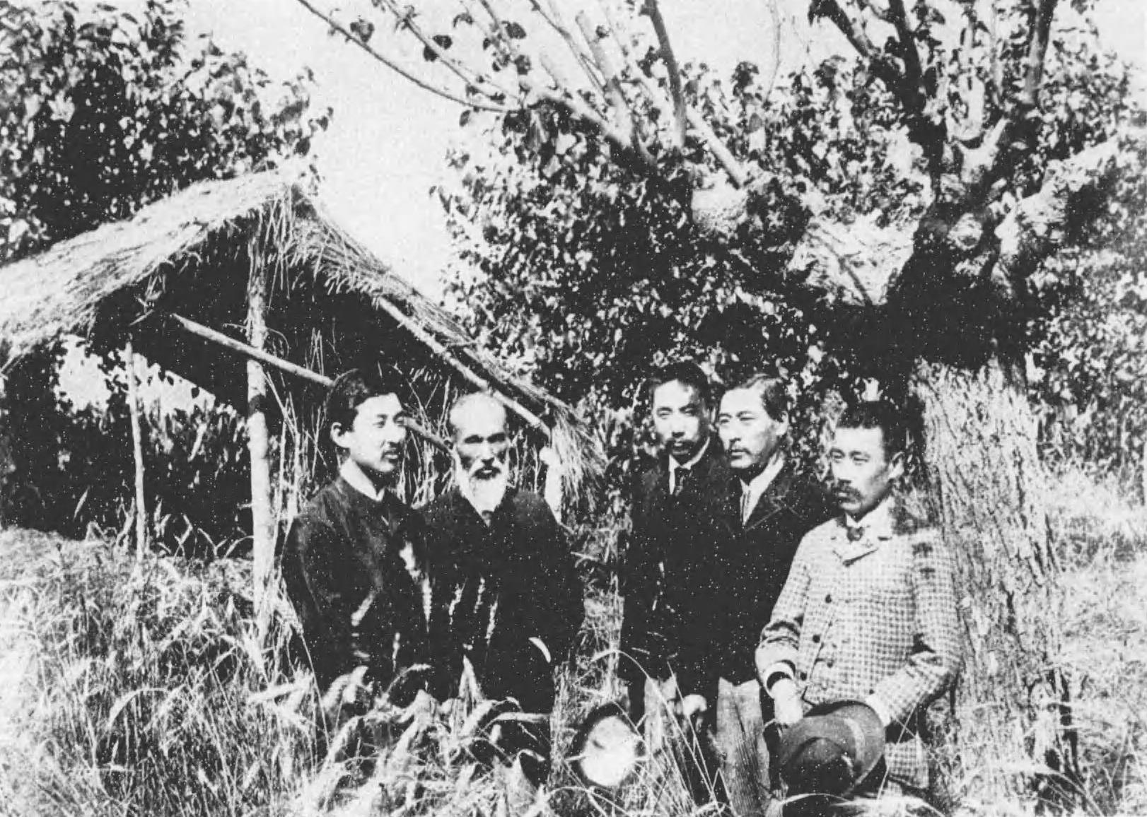 洋行当時の三吉米熊（伊国ミランに於て） 右より三吉米熊、木村九蔵、高島北海、大里忠一郎、田中甚平